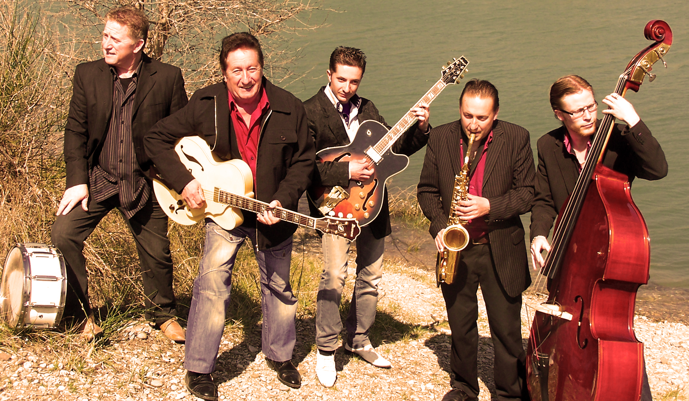 famille Coco Briaval en 2013